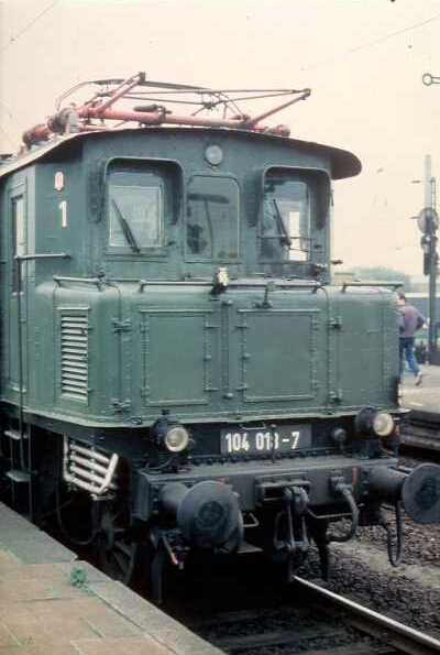 104 018 kurz vor ihrer Abstellung beim Bahnhofsfest in Oberhausen Hbf.